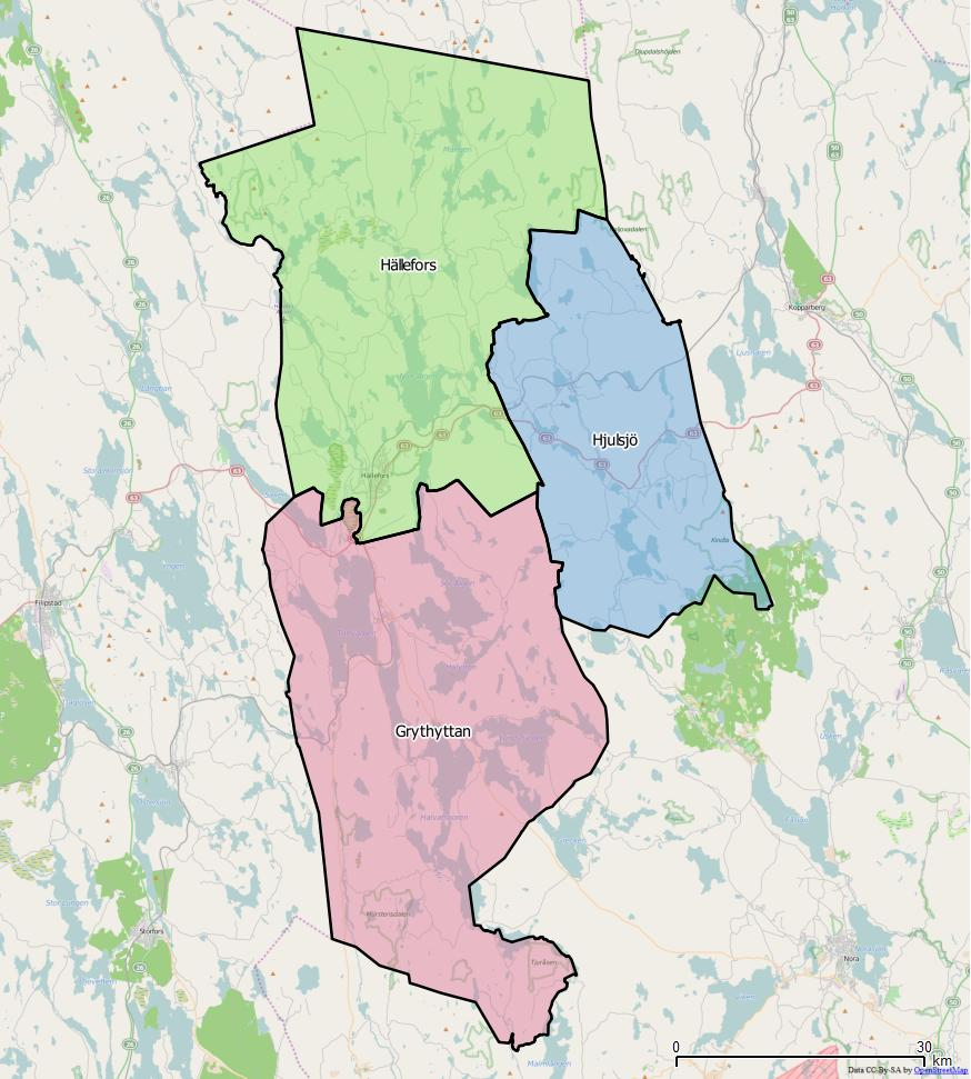 Distriktsindelningen i Hällefors kommun